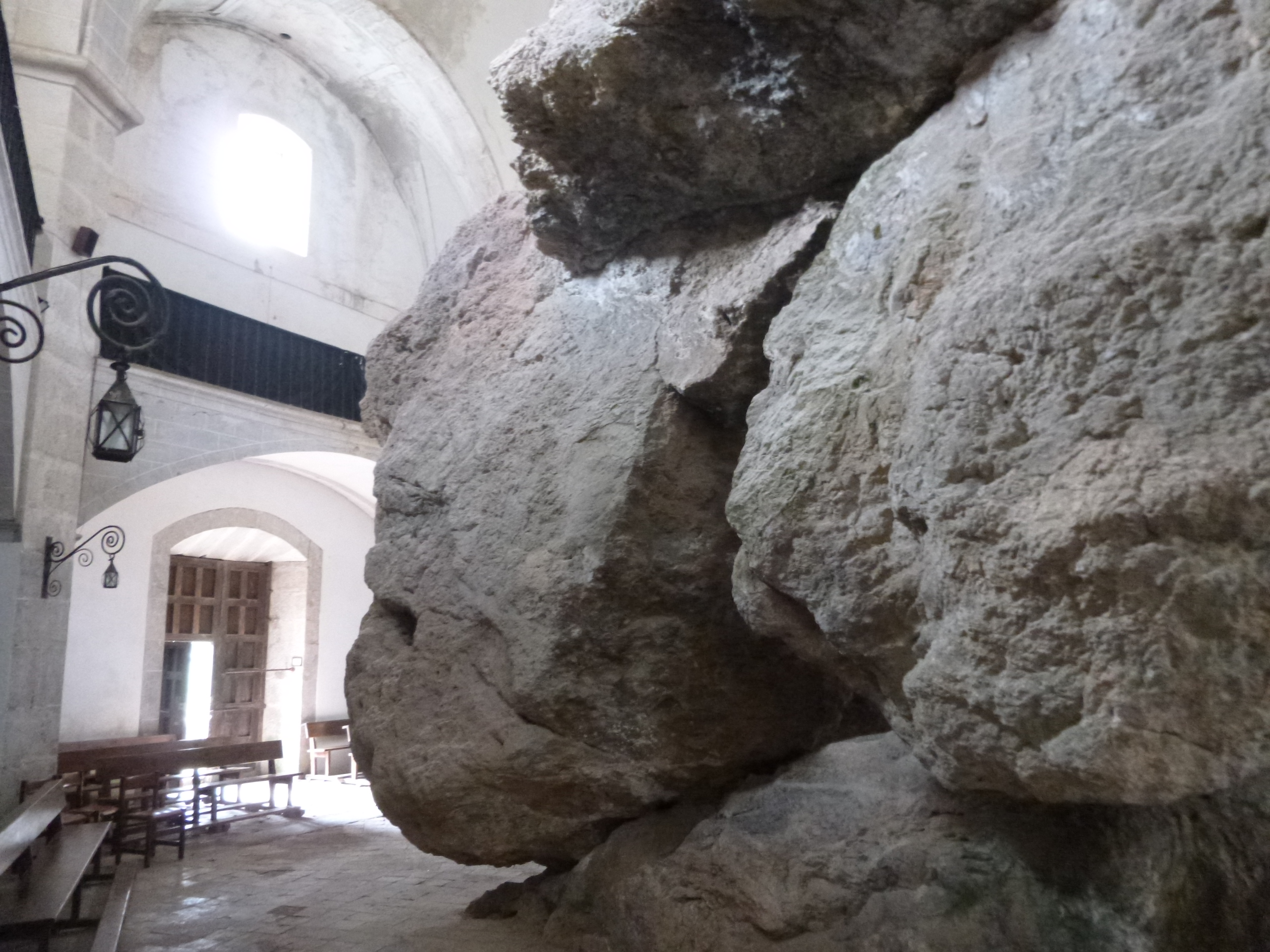 San Miguel de Arretxinaga: interior